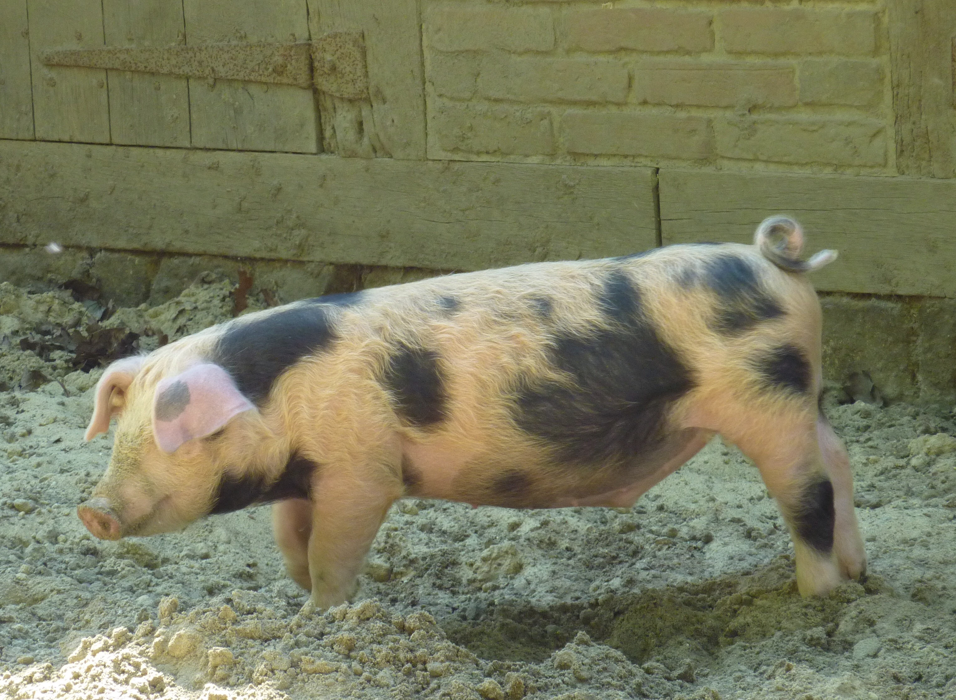 Buntes Bentheimer Schwein im Museumsdorf Cloppenburg